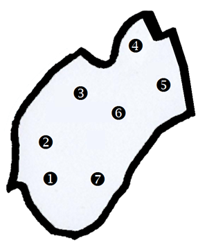 plan secteur cureghem